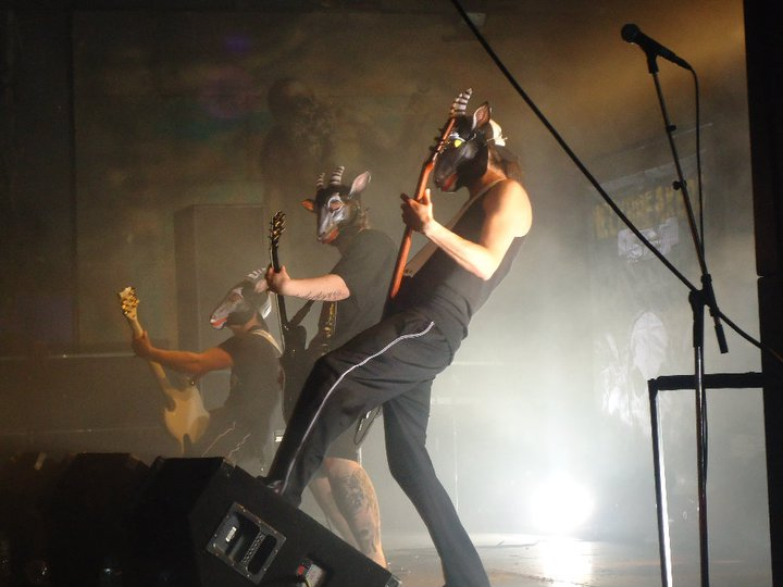 Milking the Goatmachine beim Neckbreakers Ball im LKA - Longhorn Stuttgart 2011